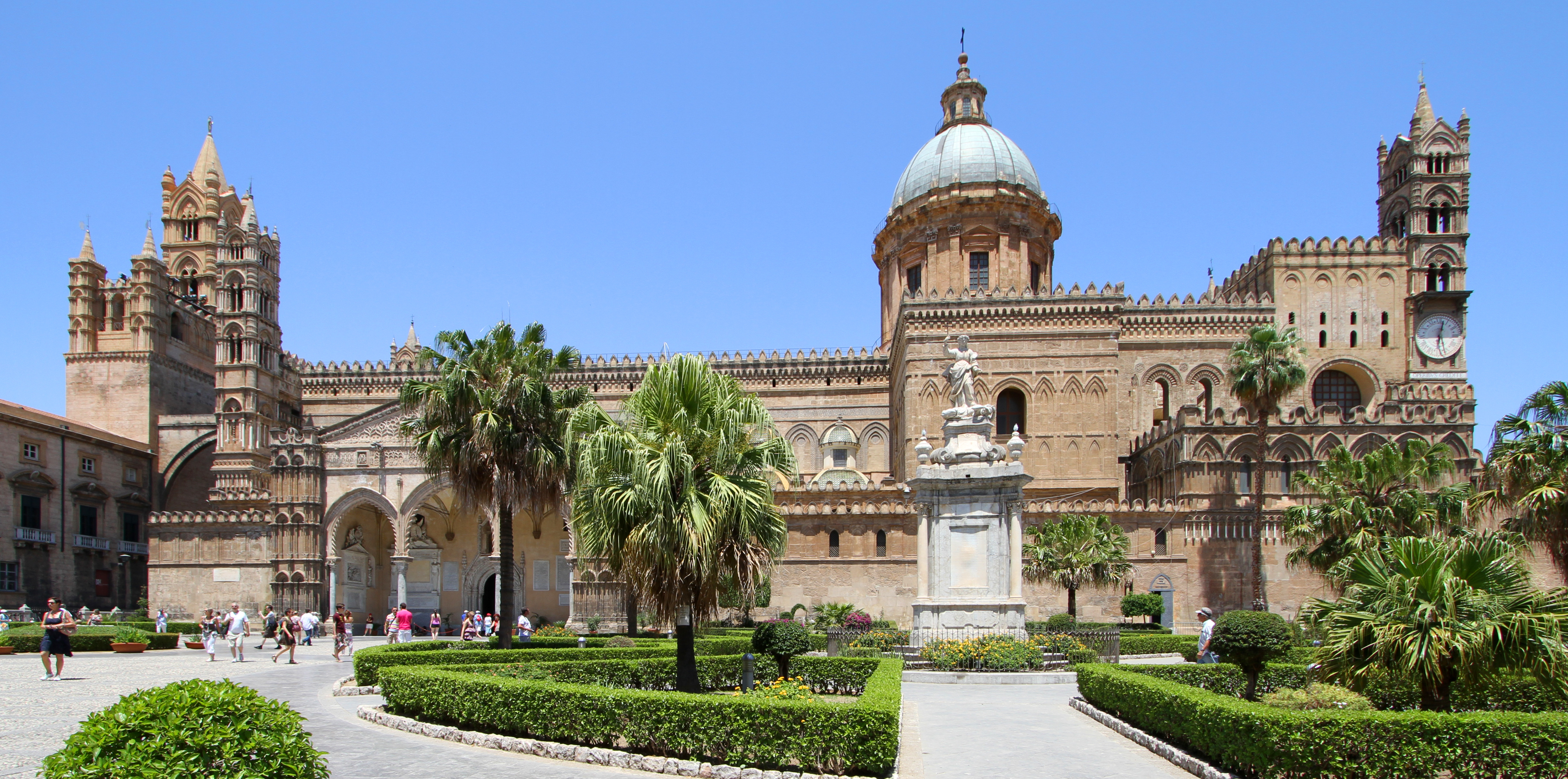 Cattedrale di Palermo